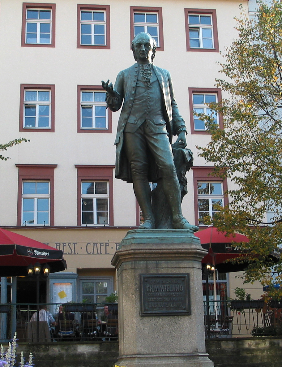 Ch. M. Wieland Denkmal auf dem Wieland-Platz in Weimar